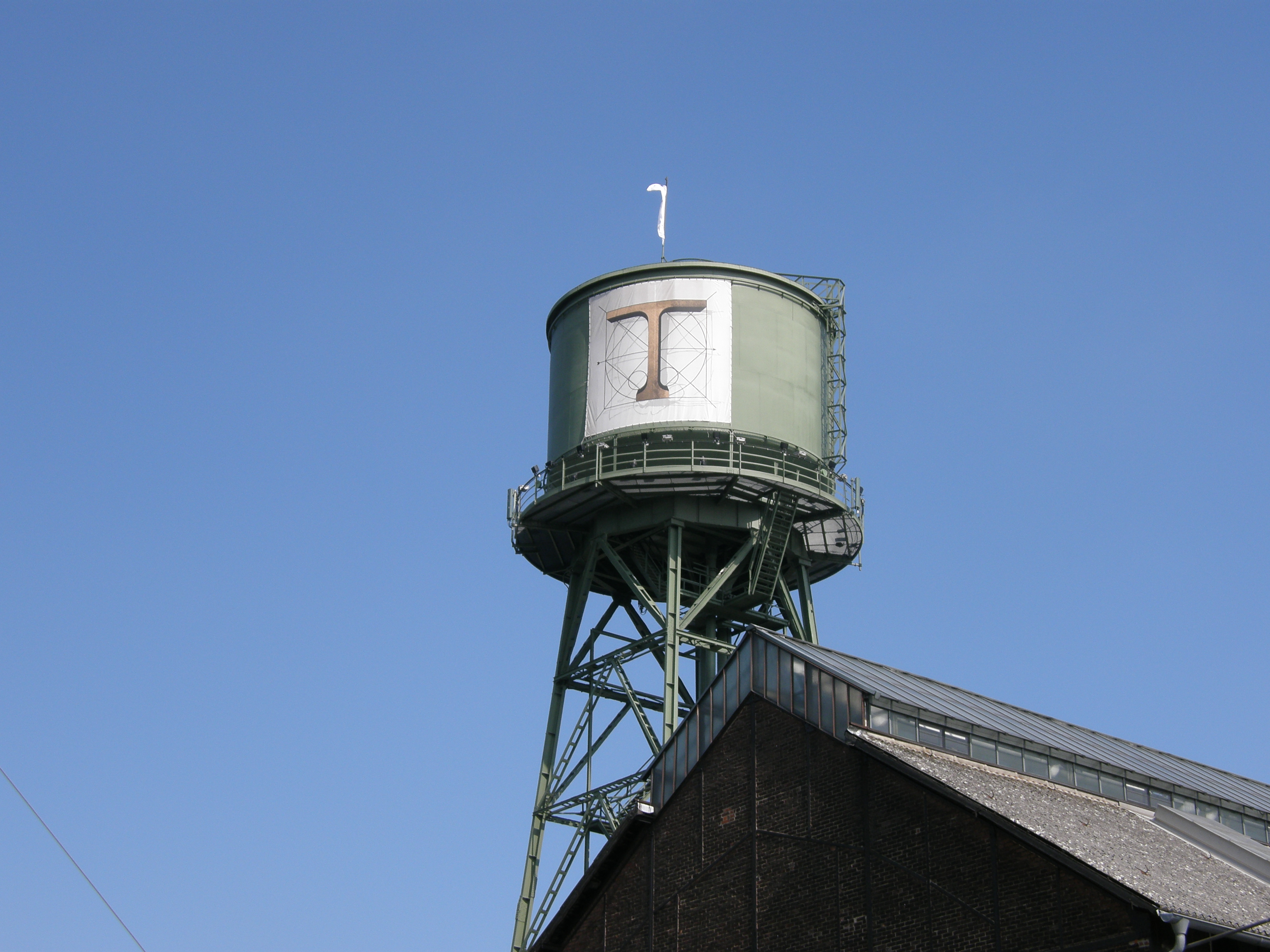 Jahrhunderthalle in Bochum Wasserturm mit Plakat der Ruhrtrienale